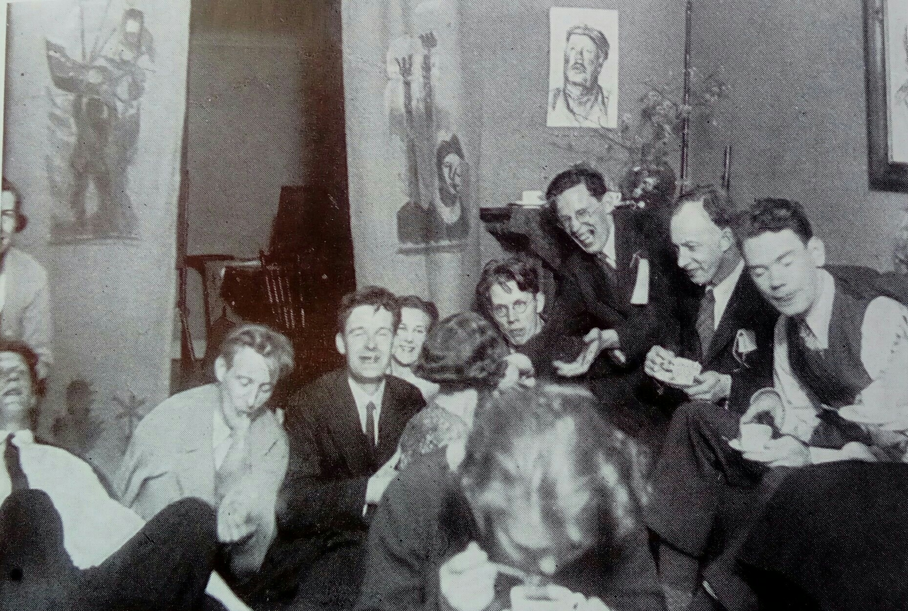 De svenska författarna Josef Kjellgren (1:a från vänster), Rudolf Värnlund (2:a fr.v.), Gustav Sandgren (3:a från höger), Eyvind Johnson (2:a fr.h.) och Artur Lundkvist (1:a fr.h.) på fest hos Värnlund på 1930-talet.